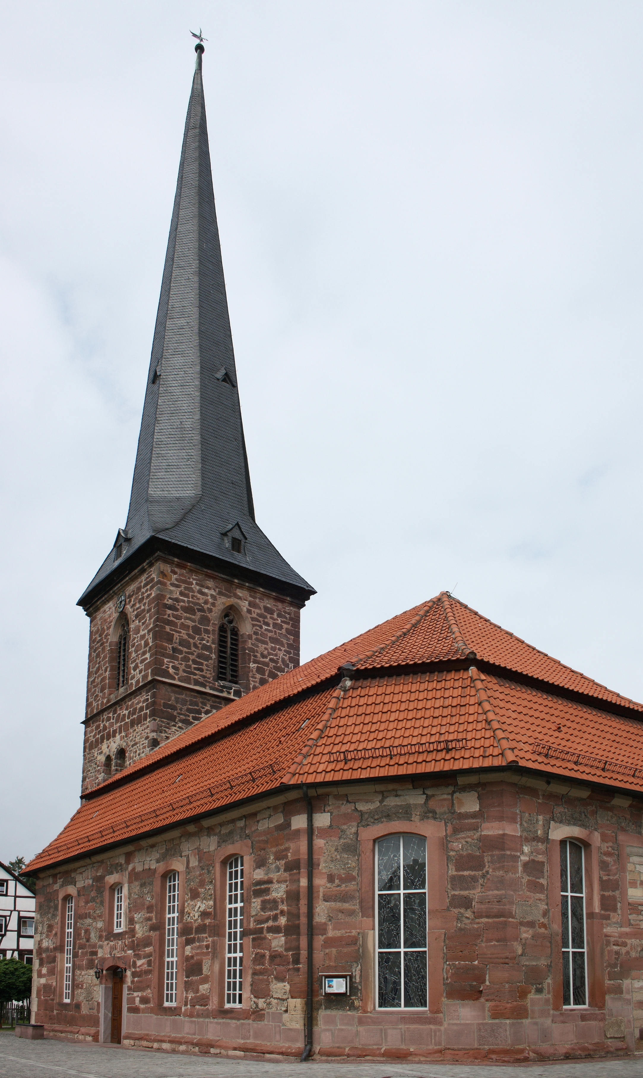 Evangelische Pfarrkirche von Reichensachsen, einem Ortsteil von Wehretal im Werra-Meißner-Kreis (Hessen)